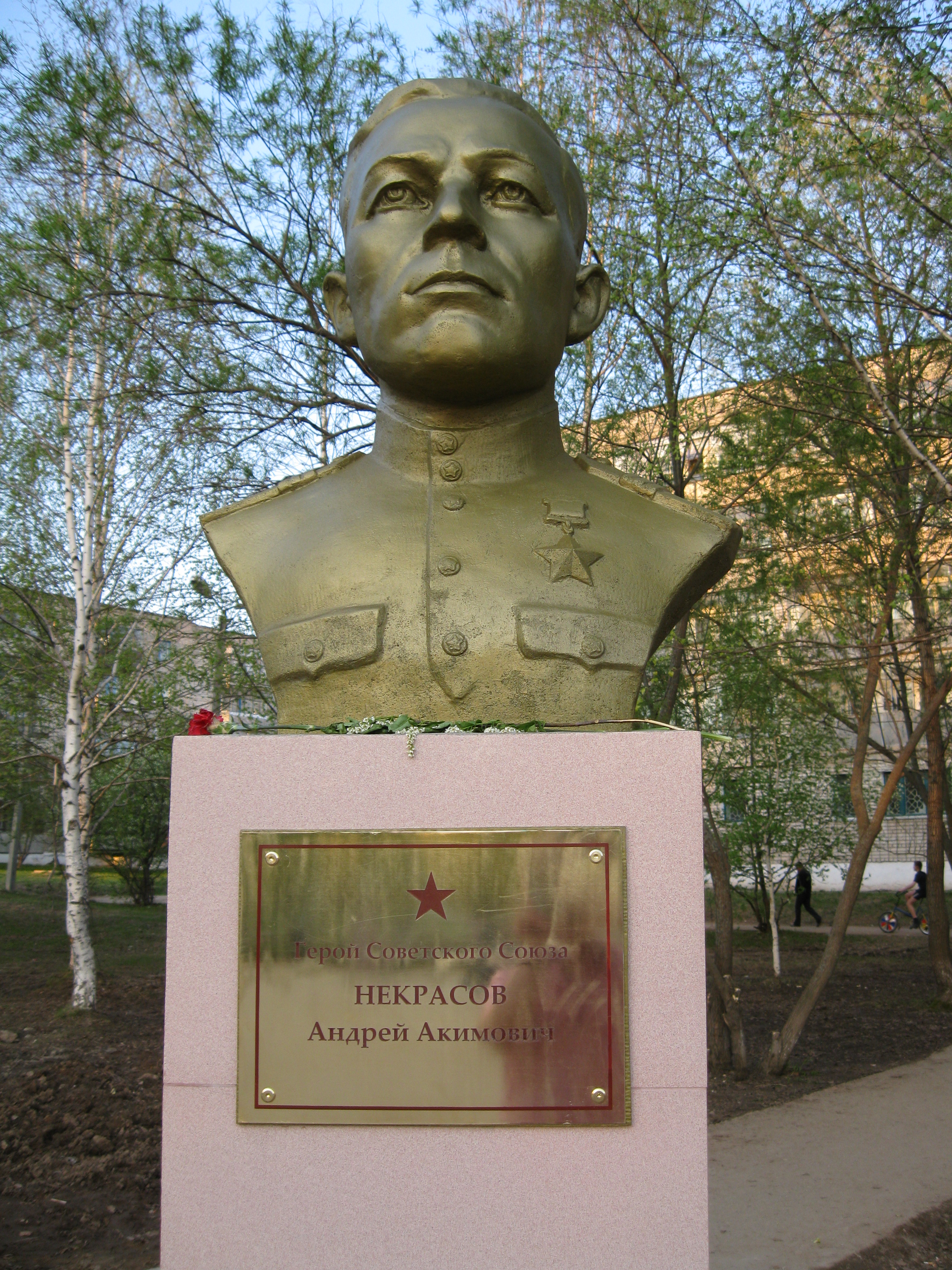 Бюст Андрея Акимовича Некрасова на Аллее Славы, открытой 09.05.2010 года в городе Чернушка.